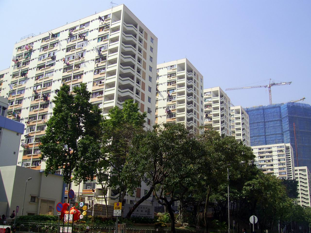 樂民新村